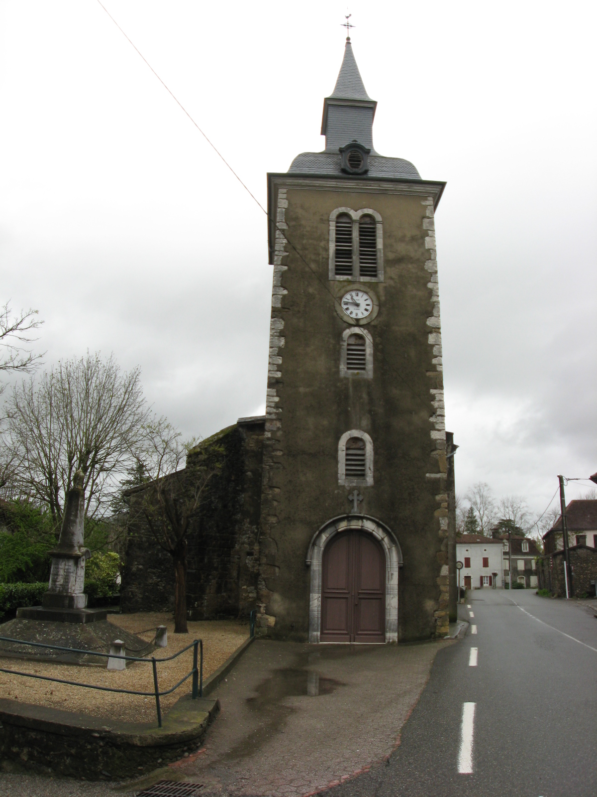 Eglise d'Escos (Pyrénées-Atlantiques) (Pyrénées).